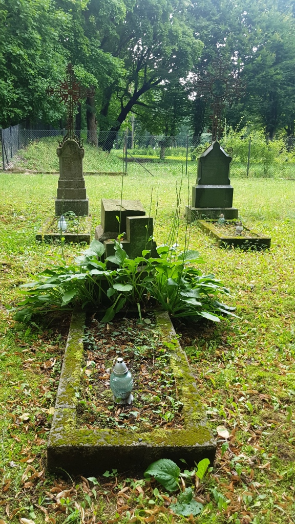 Joseph Teschner Cmentarz kanoników we Fromborku